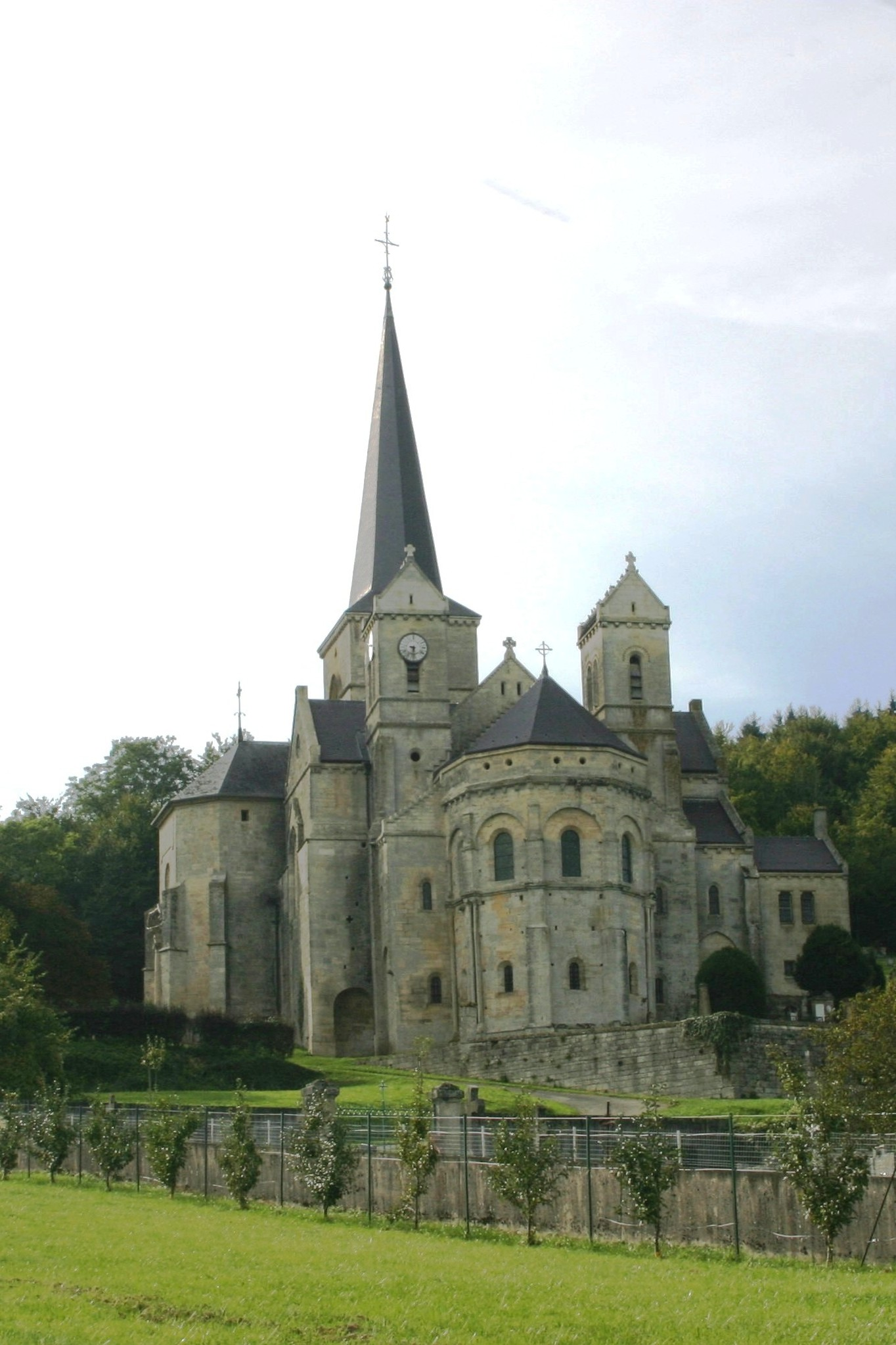 Notre Dame de Mont-devant-Sassay.